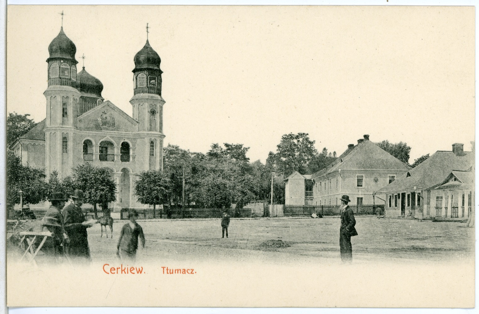 Tlumacz; Kirche und Mickiewicz-Platz This postcard is from publisher Brück & Sohn in Meißen ( This postcard has a unique number 03723 and is available in a higher resolution at the publisher. This images was uploaded in a cooperation project between Wikipedians and the publisher.